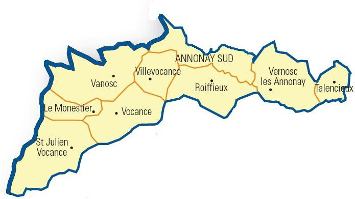 Carte détaillée des communes du canton (Ardèche)